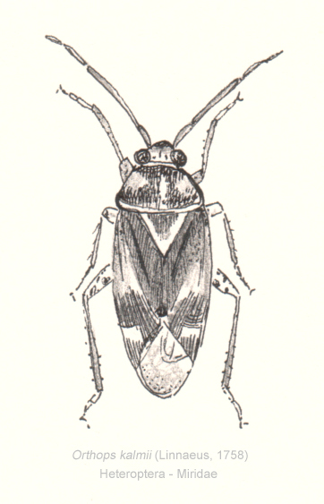 Orthops kalmii (Miridae - Heteroptera)